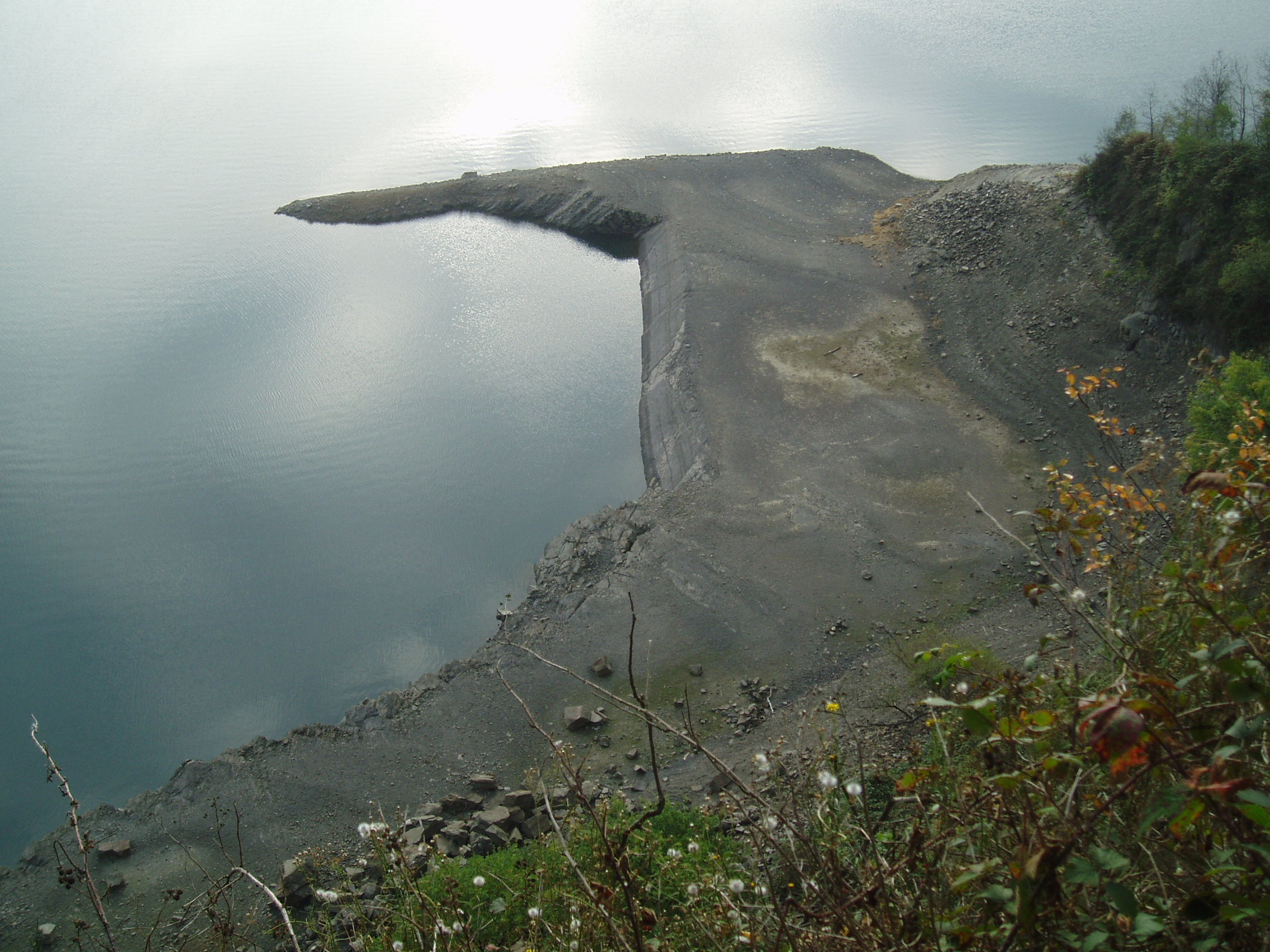 Steinbruch bei Pinn, aus dem das Schüttmaterial für den Damm der Wahnbachtalsperre abgebaut wurde, aufgenommen am 14.10.2006.